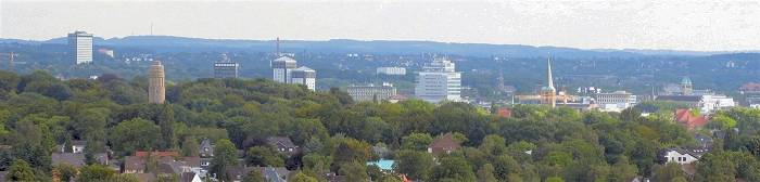 Bochum, Panorama View from Tippelsberg